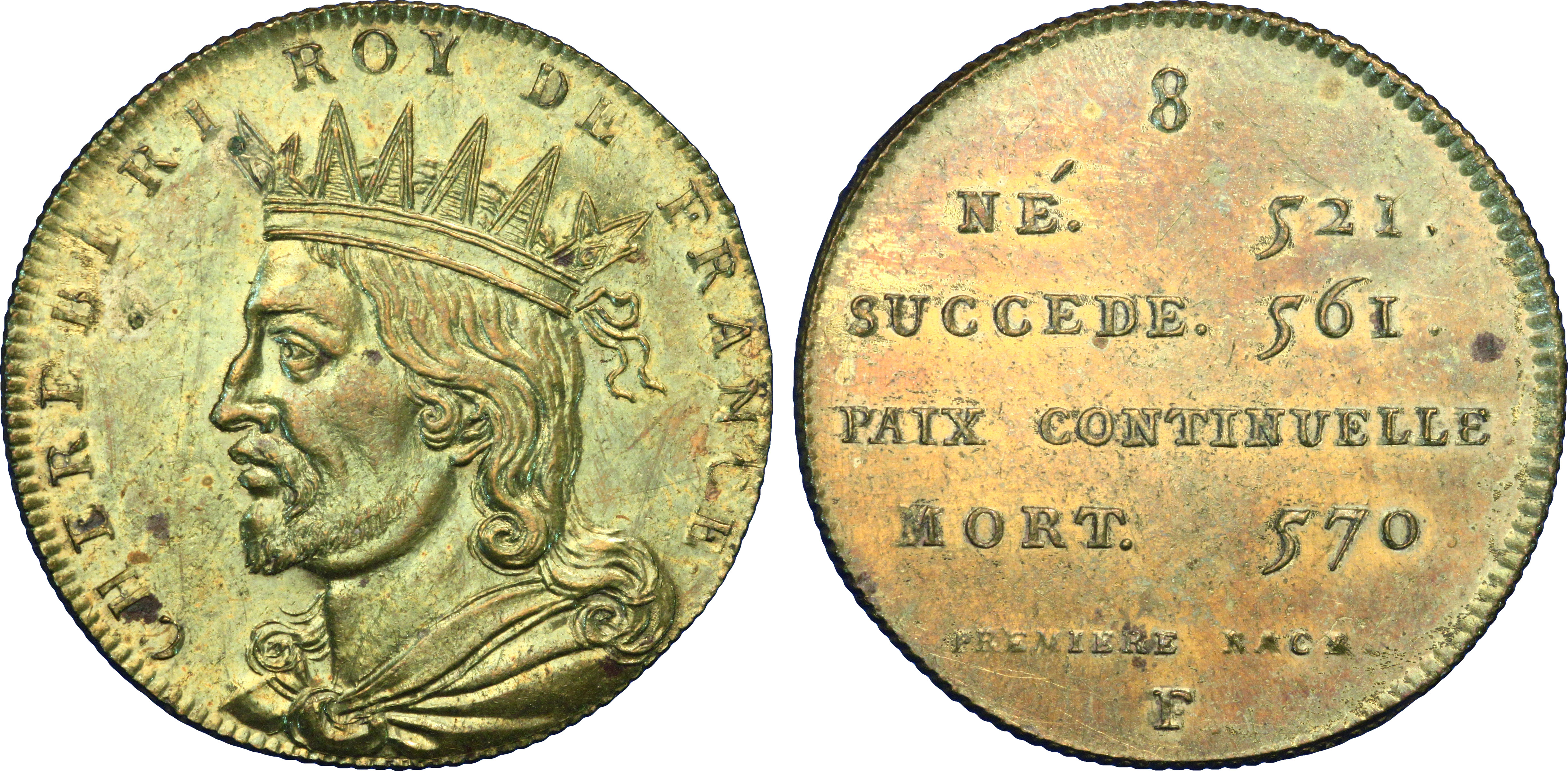 Métal : laiton Diamètre : 32mm Axe des coins : 12h. Poids : 15,20g. Tranche : cannelée Degré de rareté : R2 Titulature avers : CHEREBERT ROY DE FRANCE. Description avers : Buste imaginaire drapé, radié et couronné à gauche. Titulature revers : 8 - NÉ 521 - SUCCEDE 561 - PAIX CONTINUELLE - MORT 570 - PREMIERE RACE / P.. Description revers : en sept lignes